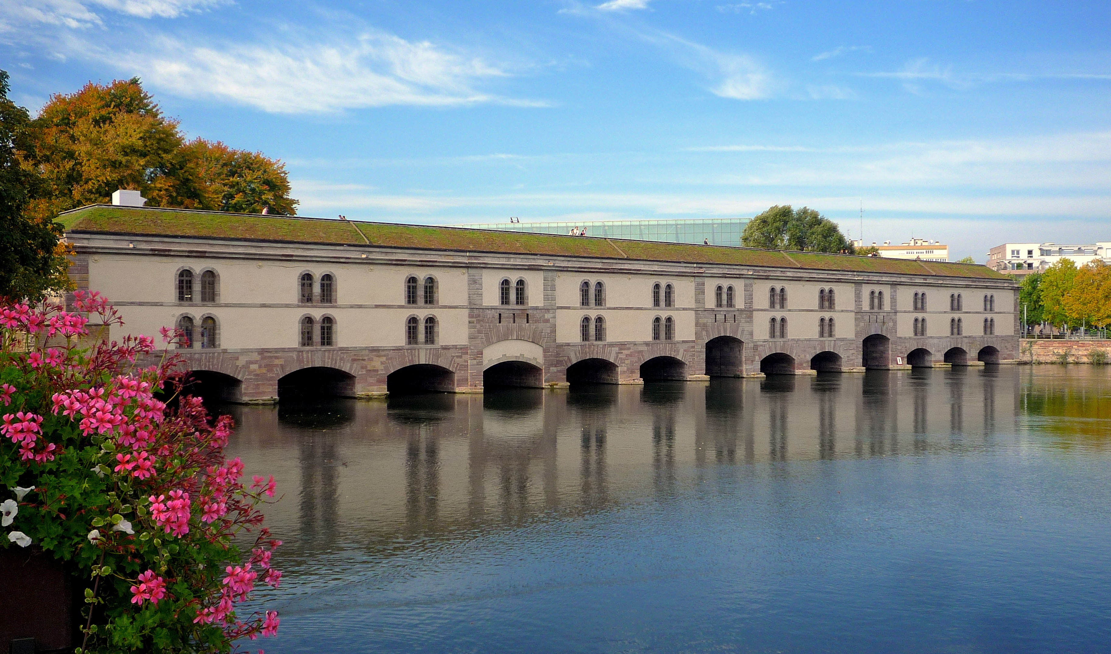 Strasbourg le barrage Vauban après sa restauration en 2012.